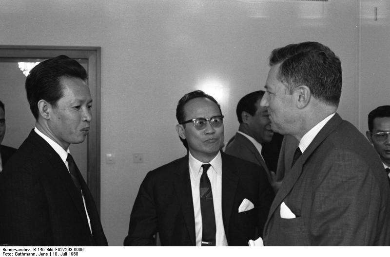 MdB Blumenfeld gibt Empfang für Parlamentarier aus Vietnam. Vizepräsident des Parlaments Nguyen Ba Can im Restaurant "Am Tulpenfeld"